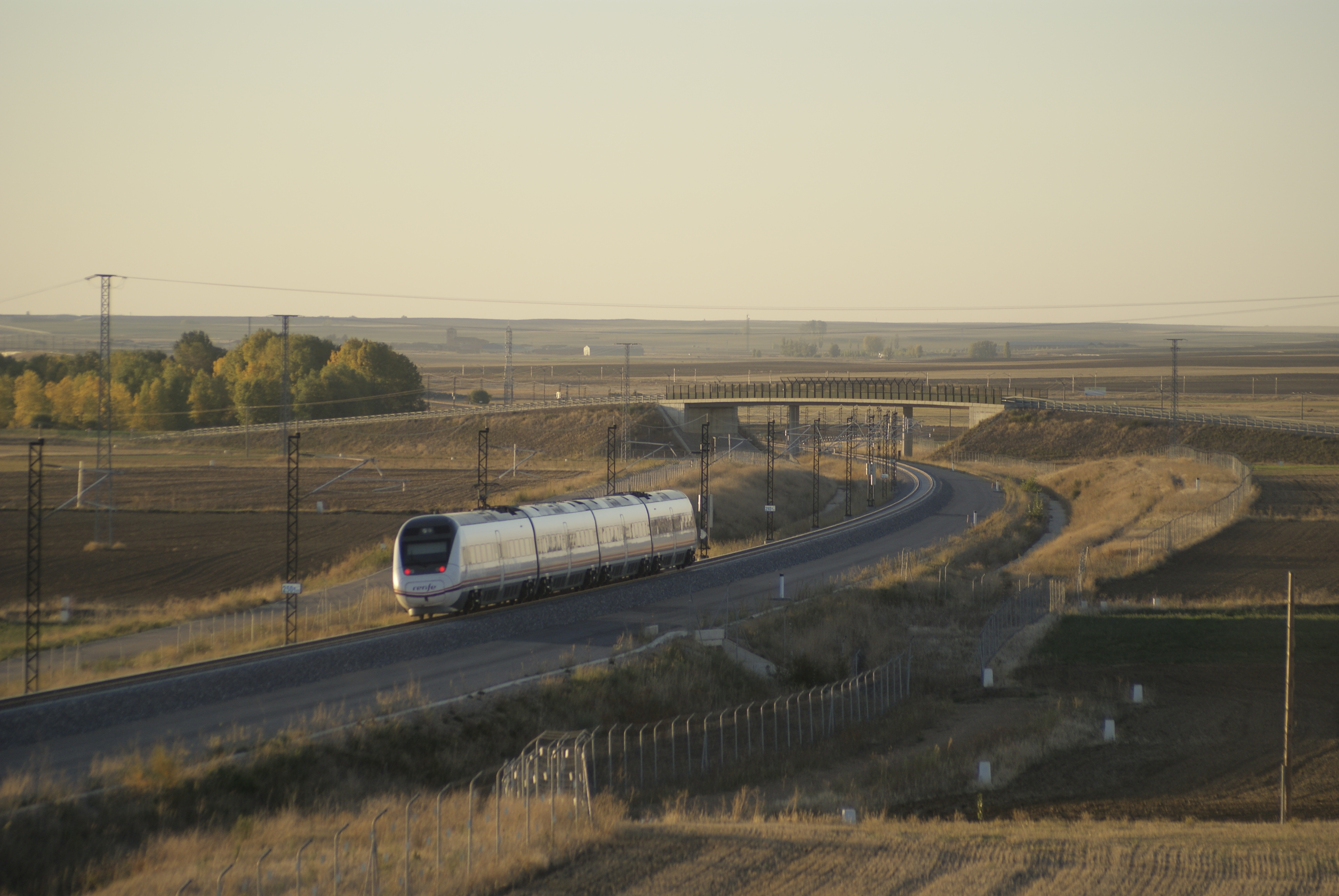 Servicio Media Distancia en un tren Serie 121 de Renfe circulando por la Línea de alta velocidad Valladolid-Palencia-León en el término municipal de Paredes de Nava.